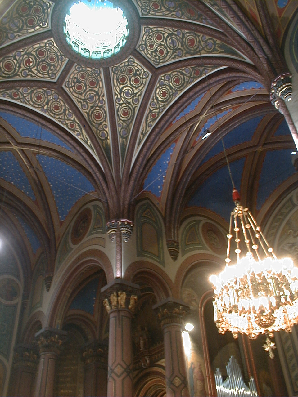 eigen foto, publiek